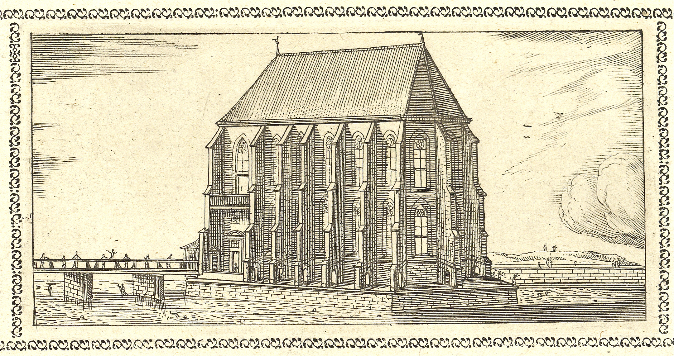 Wasserkirche Zurich (Switzerland); etching from 1661